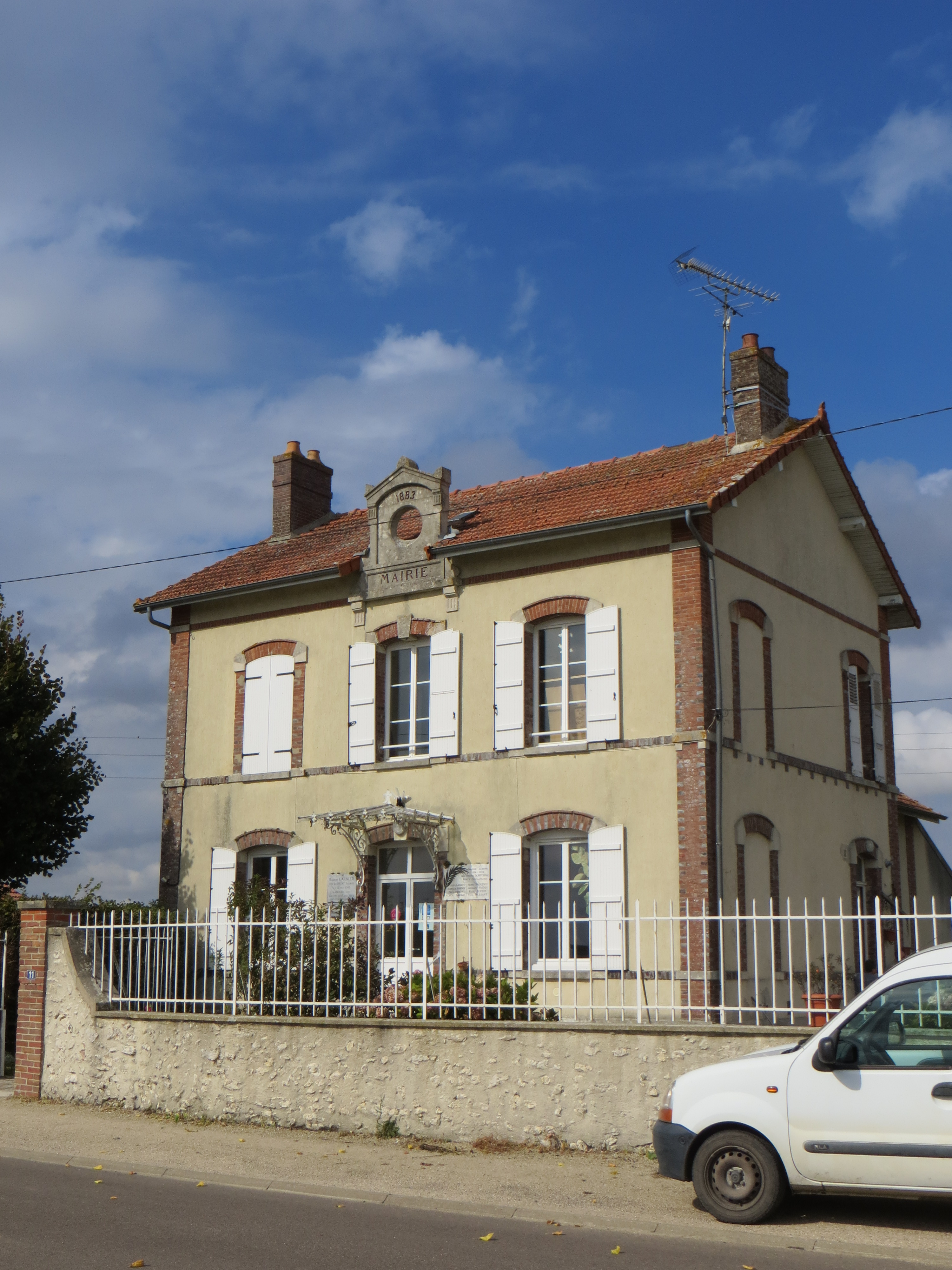 Mairie. Le fronton porte la date de 1883.